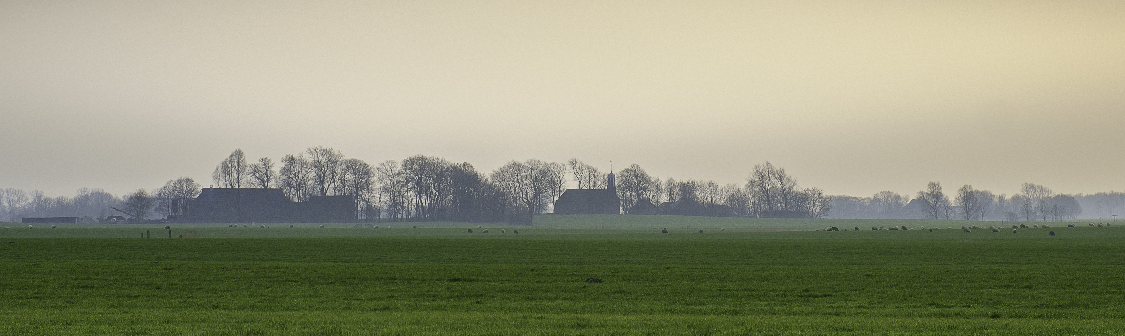 De wierde van Fransum in de winter